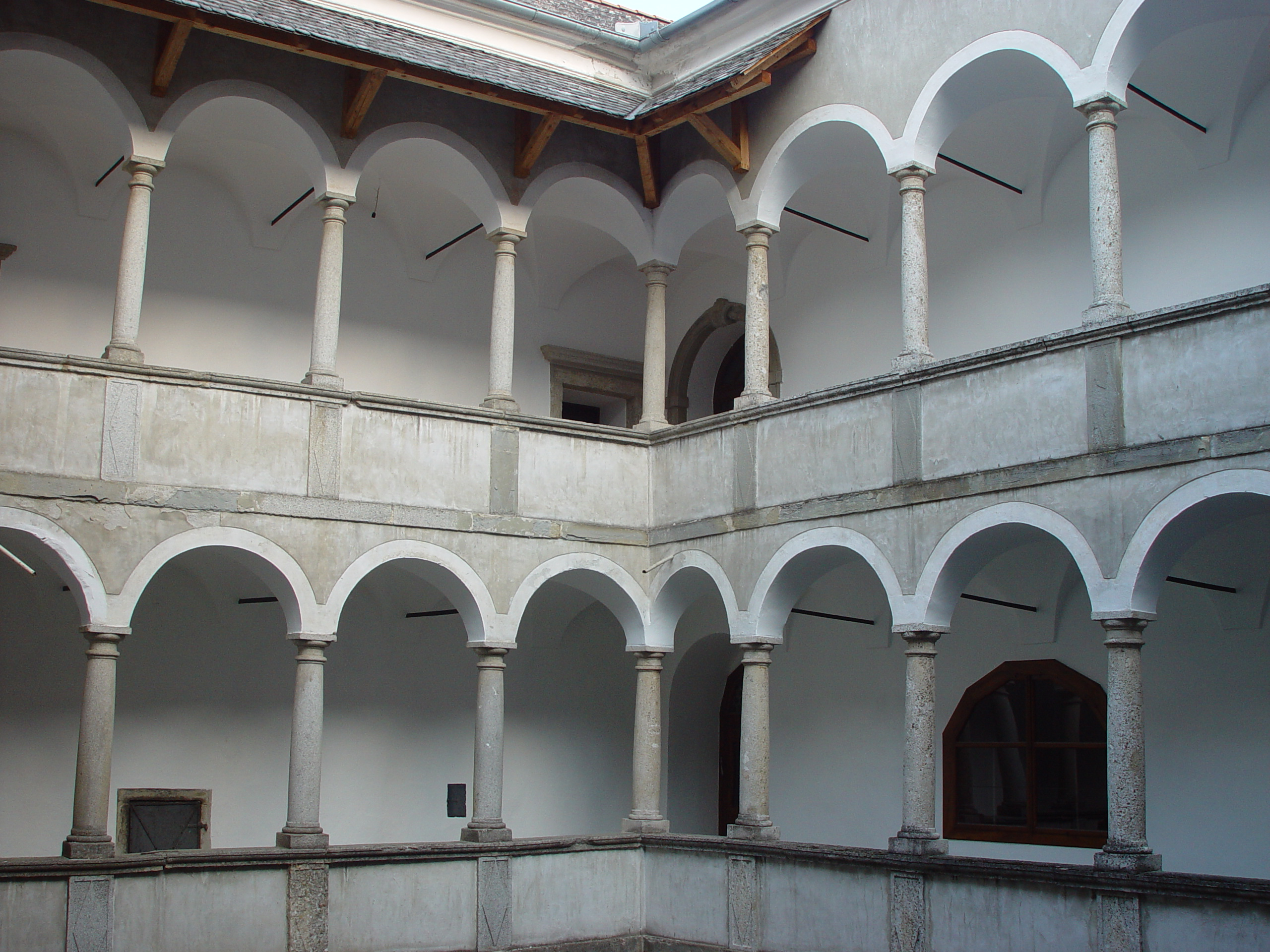 Der Innenhof von Schloss Salaberg mit seinen Arkadengaengen